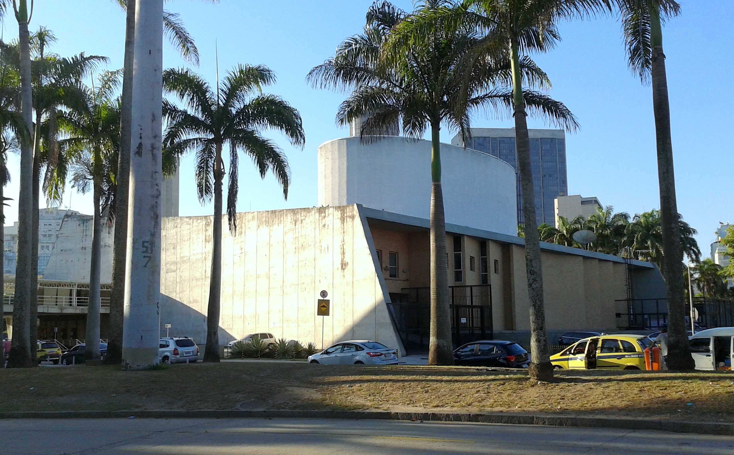 Teatro do Museu de Arte Moderna do Rio de Janeiro.